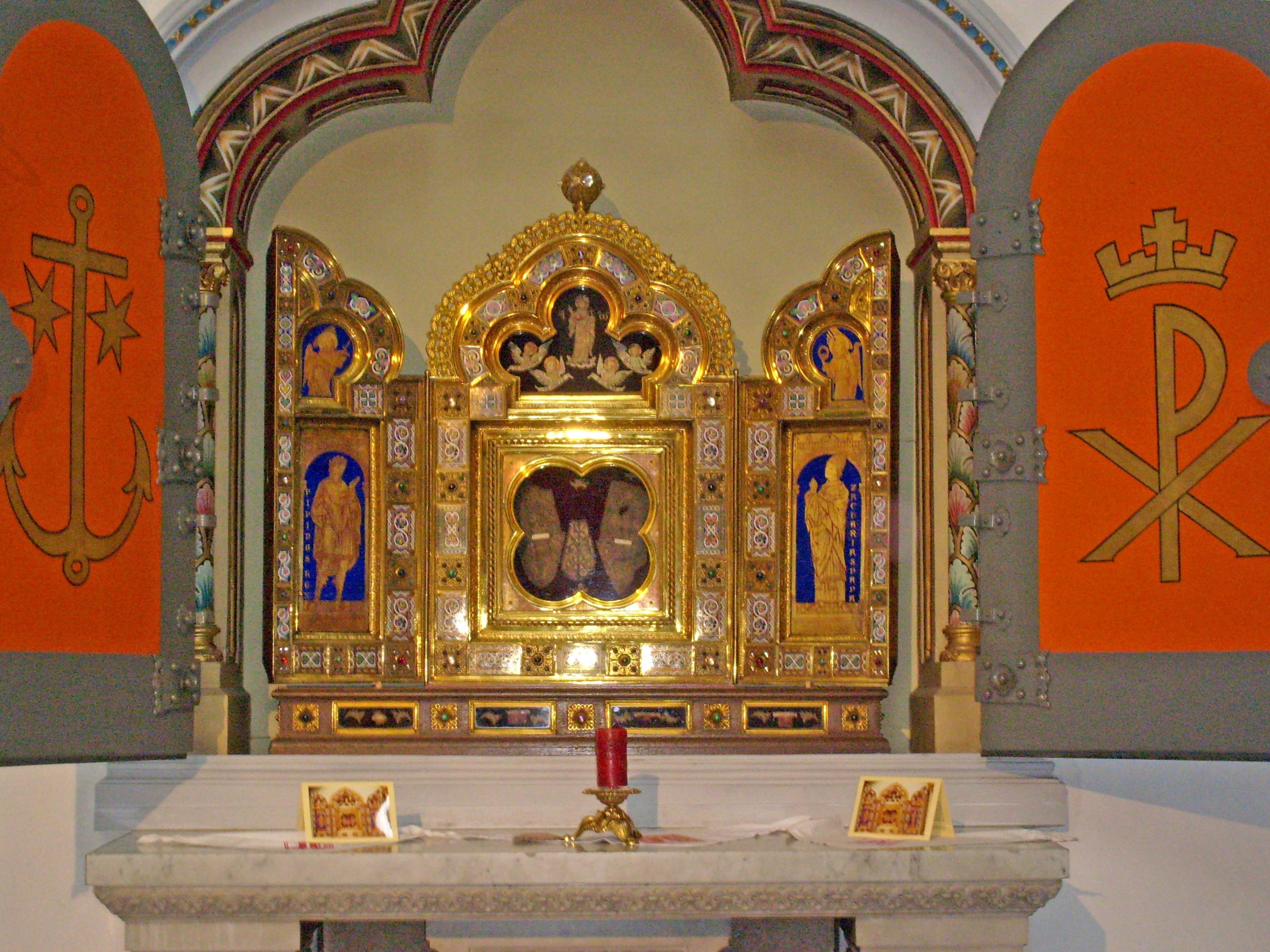 Reliquienschrein im Kloster Prüm